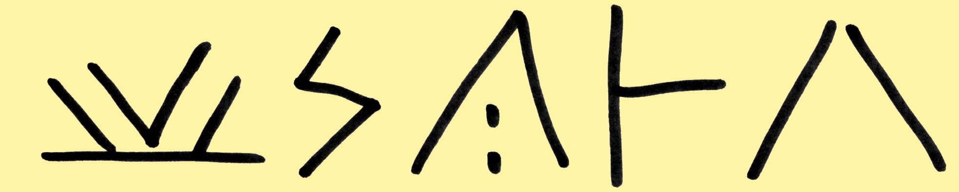 "Opheltos" Inschrift auf einem Bratspies aus Skales, Zypern